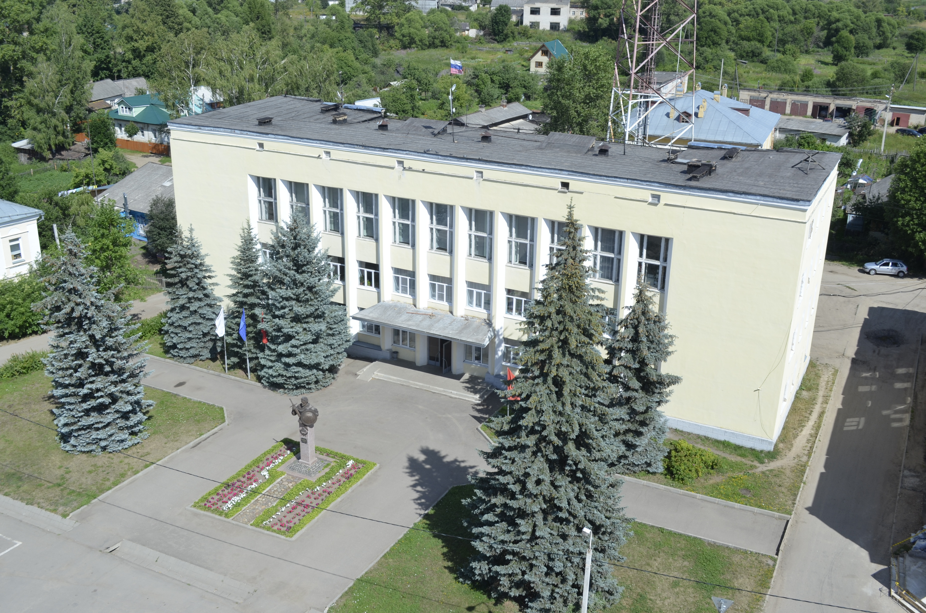 Центр Борисоглебского